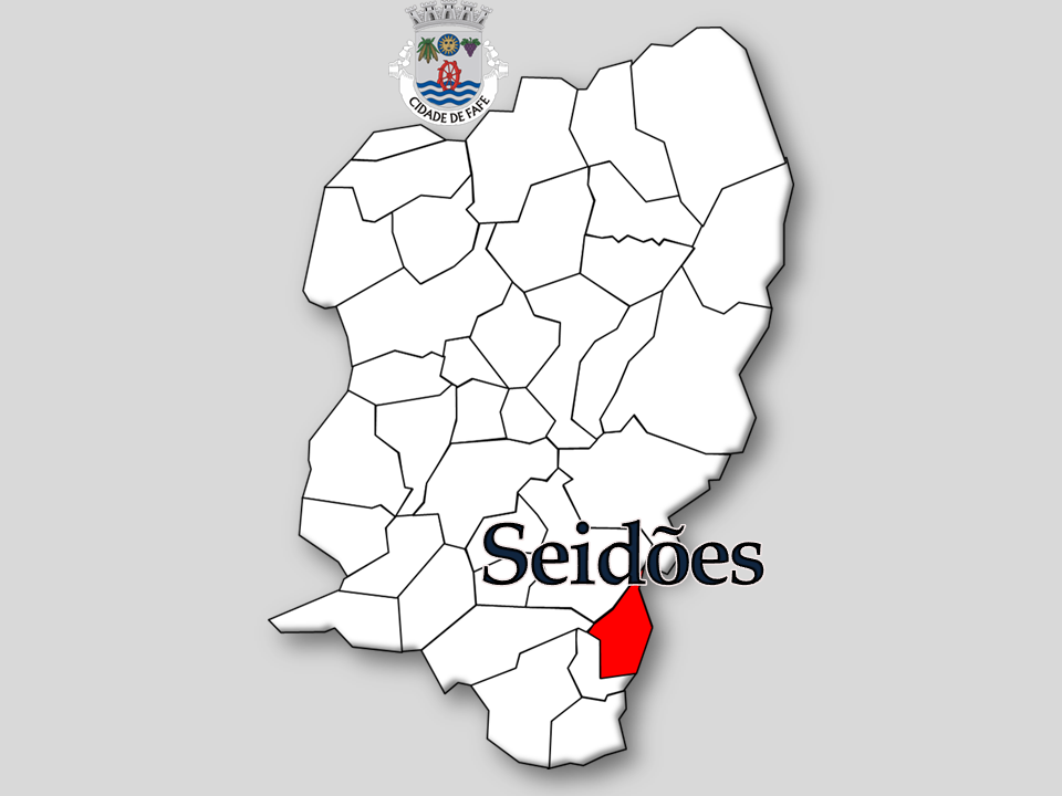 Censos 1864/2011